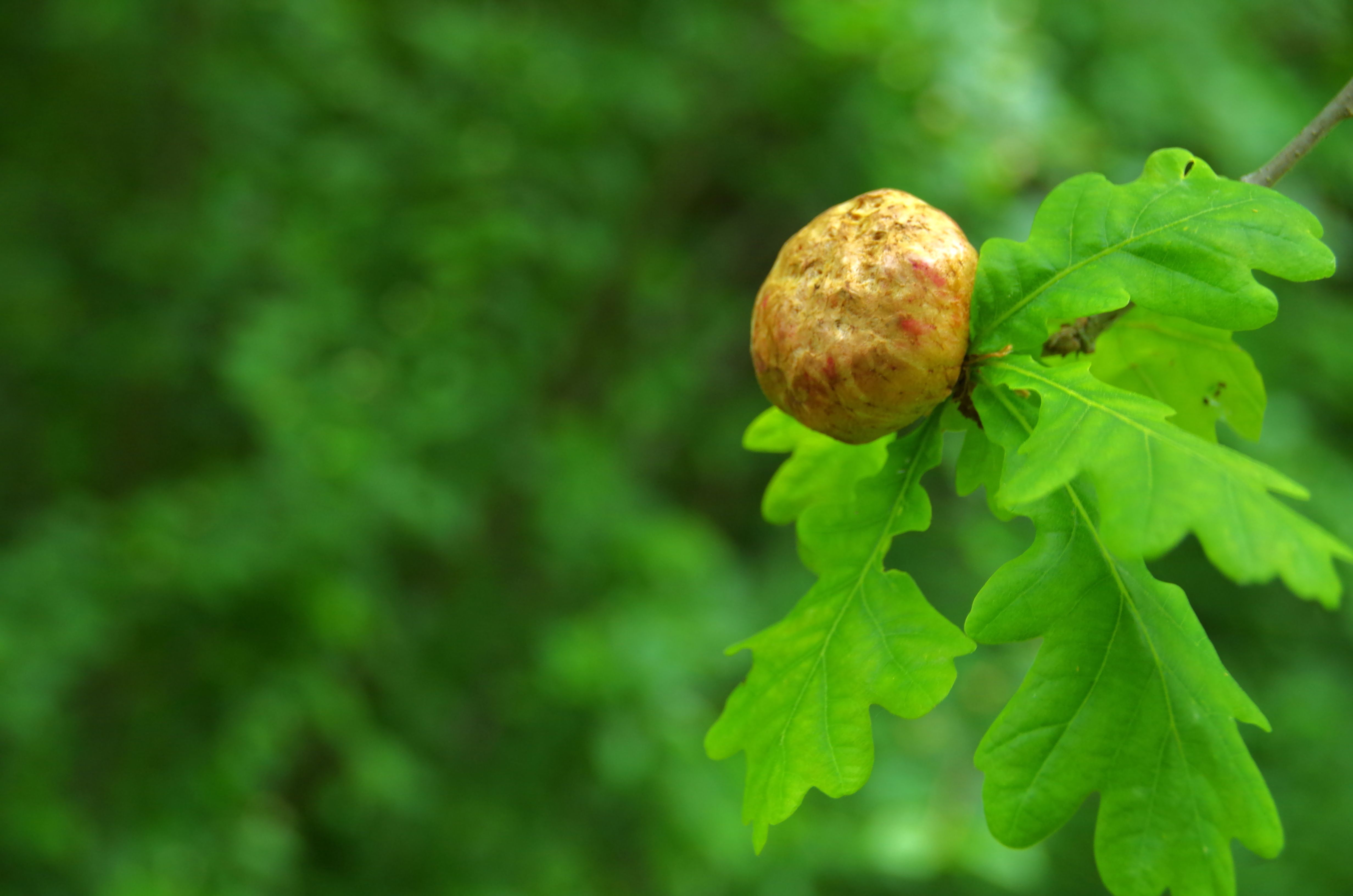 Pahkadeks ehk gallideks ehk granuloomideks nimetatakse farmaatsias mõnede taimede lehtedel, võrsetel, okstel või tüvel putukakahjustuse tagajärjel tekkivaid kasvajataolisi moodustisi. Pahad tekivad üldjuhul teatavate putukate (näiteks pahkvaablaste), bakterite jt. eritatavatest ärritatavatest ainetest, mis taimekoel kutsuvad esile haigusliku paikse vohanguna.